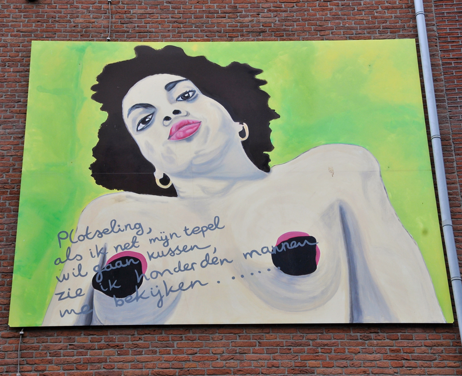 'Plotseling als ik net mijn tepel wil gaan kussen, zie ik honderden mannen me bekijken'. Kunstenares Lydia Schouten (Rotterdam 1948) maakte dit schilderij in 2002 t.b.v. de aankleding van de tippelzone aan de Keileweg. Na de sluiting van de tippelzone is het schilderij in 2005 naar de hoek Witte de Withstraat/Eendrachtsstraat verhuisd. Bron